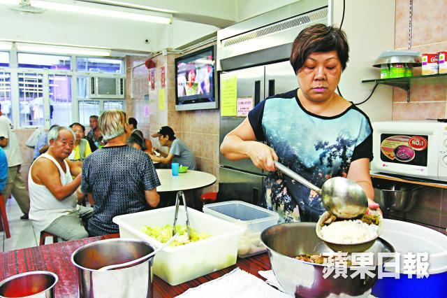 中文（香港）: 患糖尿高血壓 堅持每日派飯 「露宿者契媽」 服10種藥照幫人